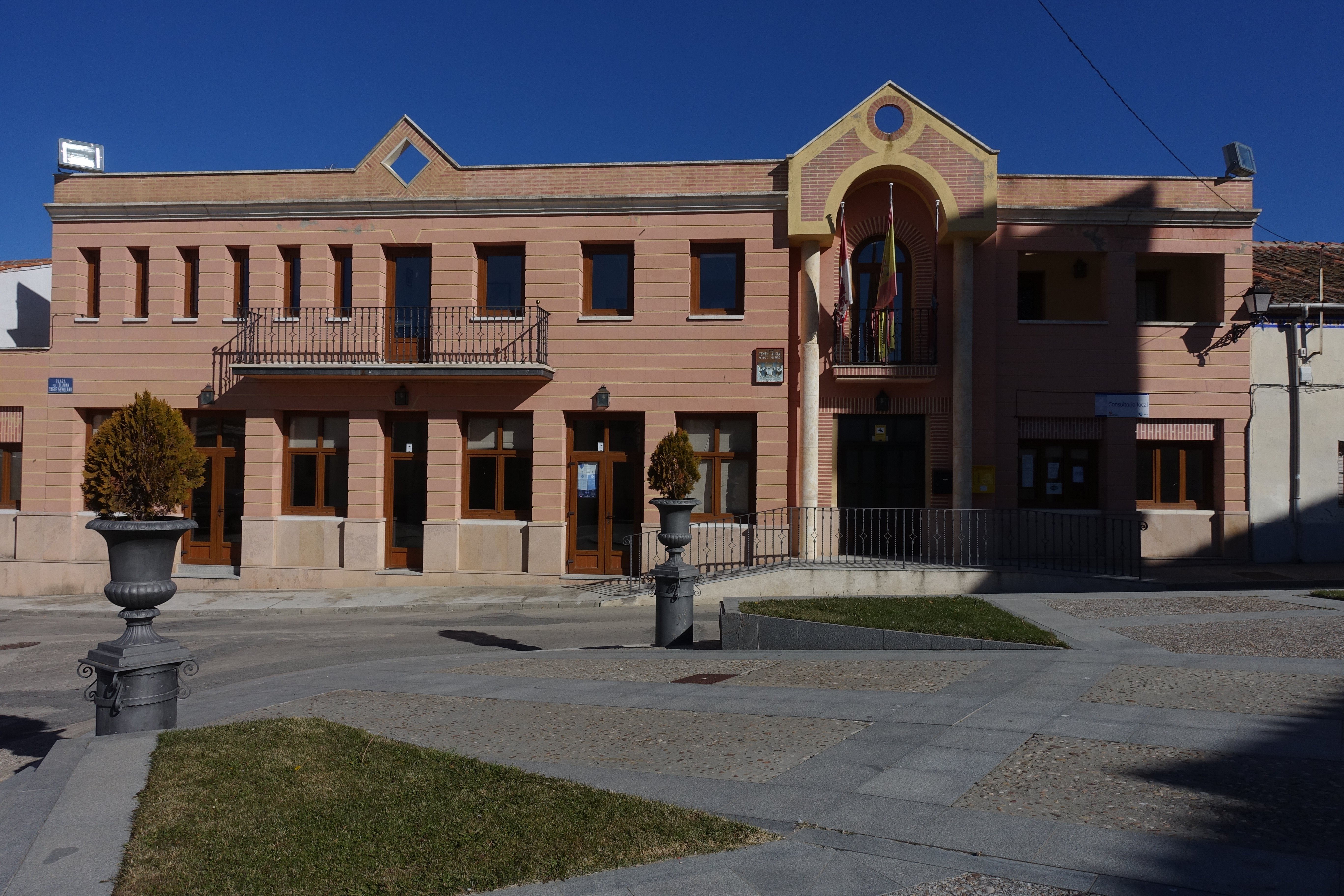 Casa consistorial de Martín Miguel (Segovia, España).